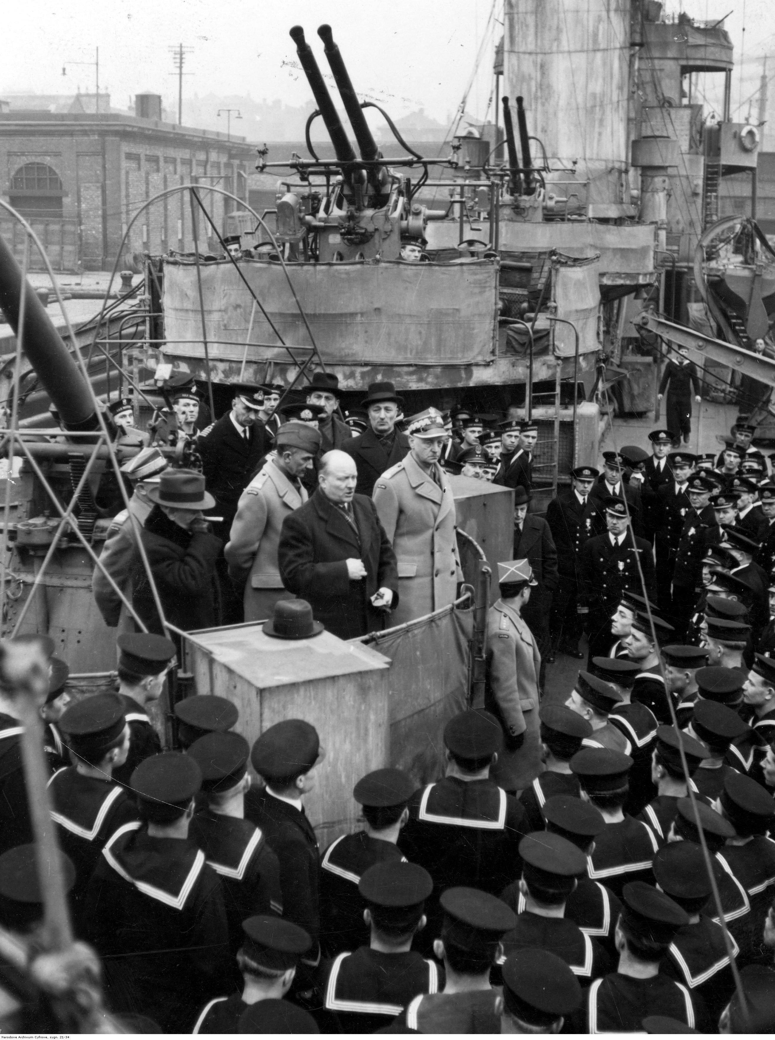 Wicepremier RP Stanisław Mikołajczyk przemawia do marynarzy na pokładzie ORP "Błyskawica". Widoczni także m.in.: gen. Władysław Sikorski (na prawo od St. Mikołajczyka), szef sztabu Naczelnego Wodza gen. Tadeusz Klimecki (na prawo za St. Mikołajczykiem), minister bez teki Karol Popiel (za gen. Sikorskim).